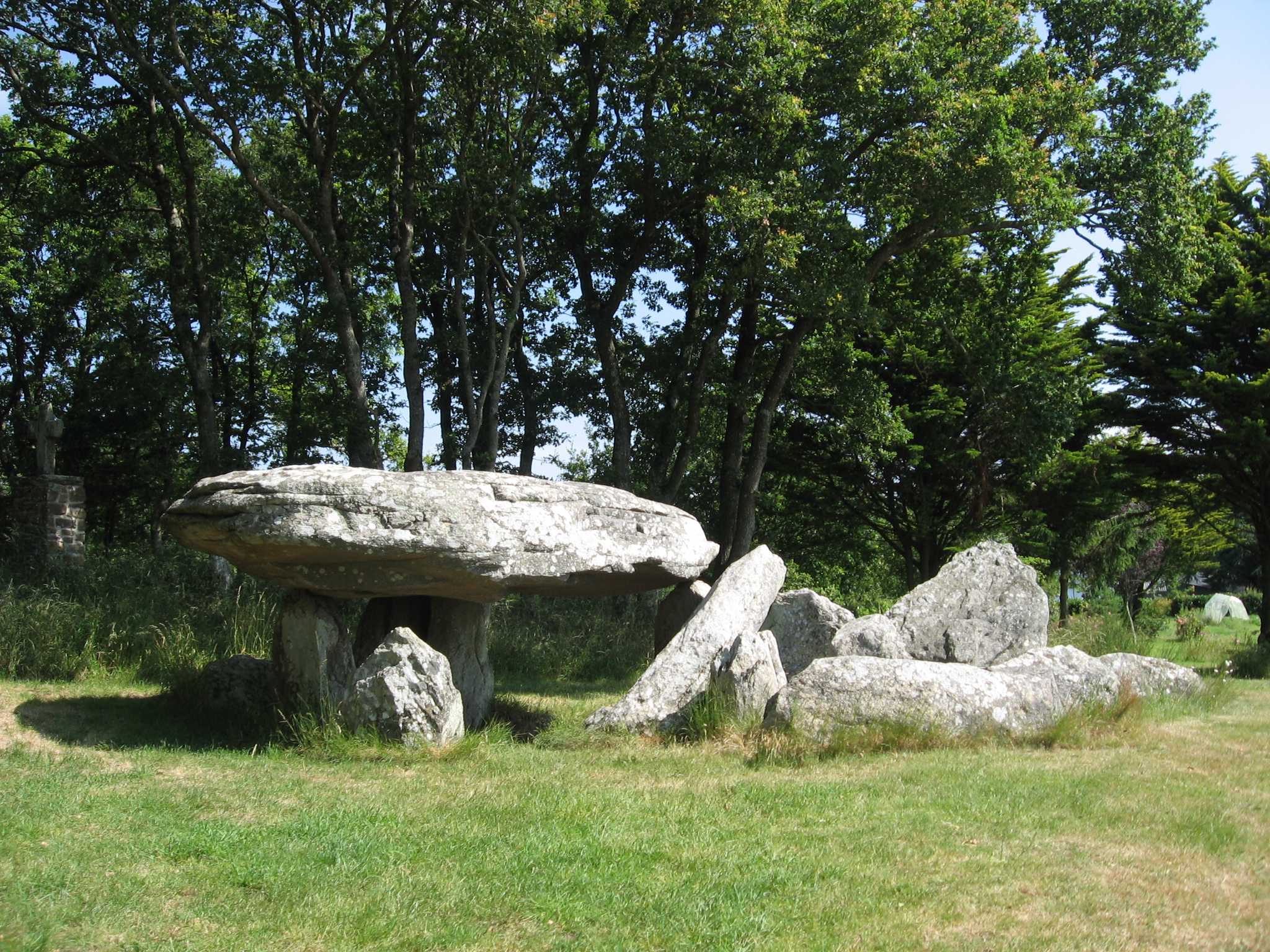 Mégalithes